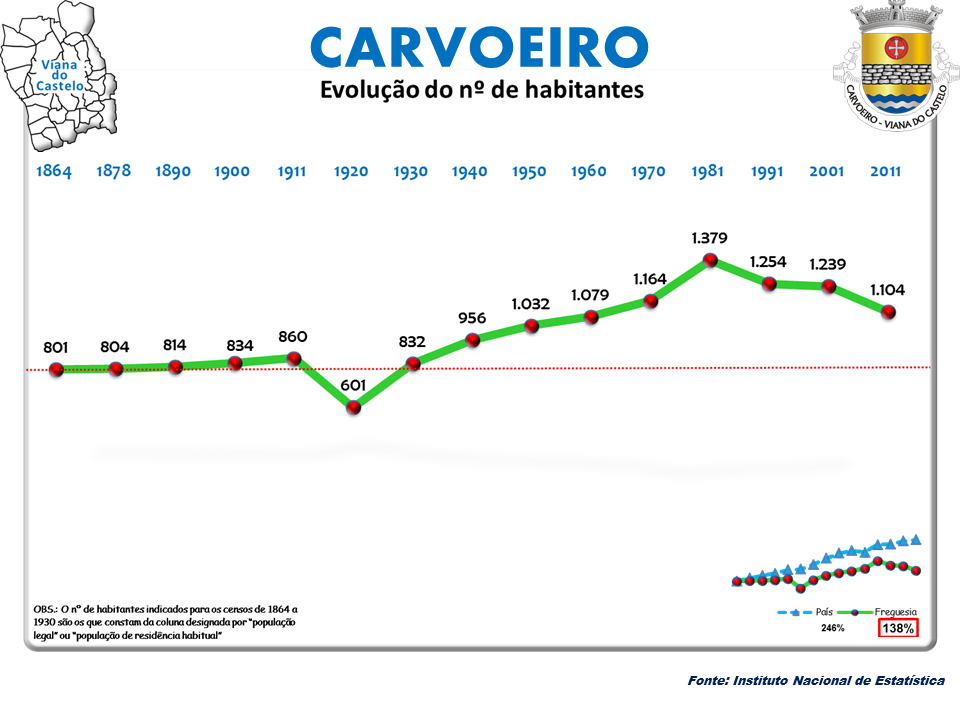 Censos 1864/2011